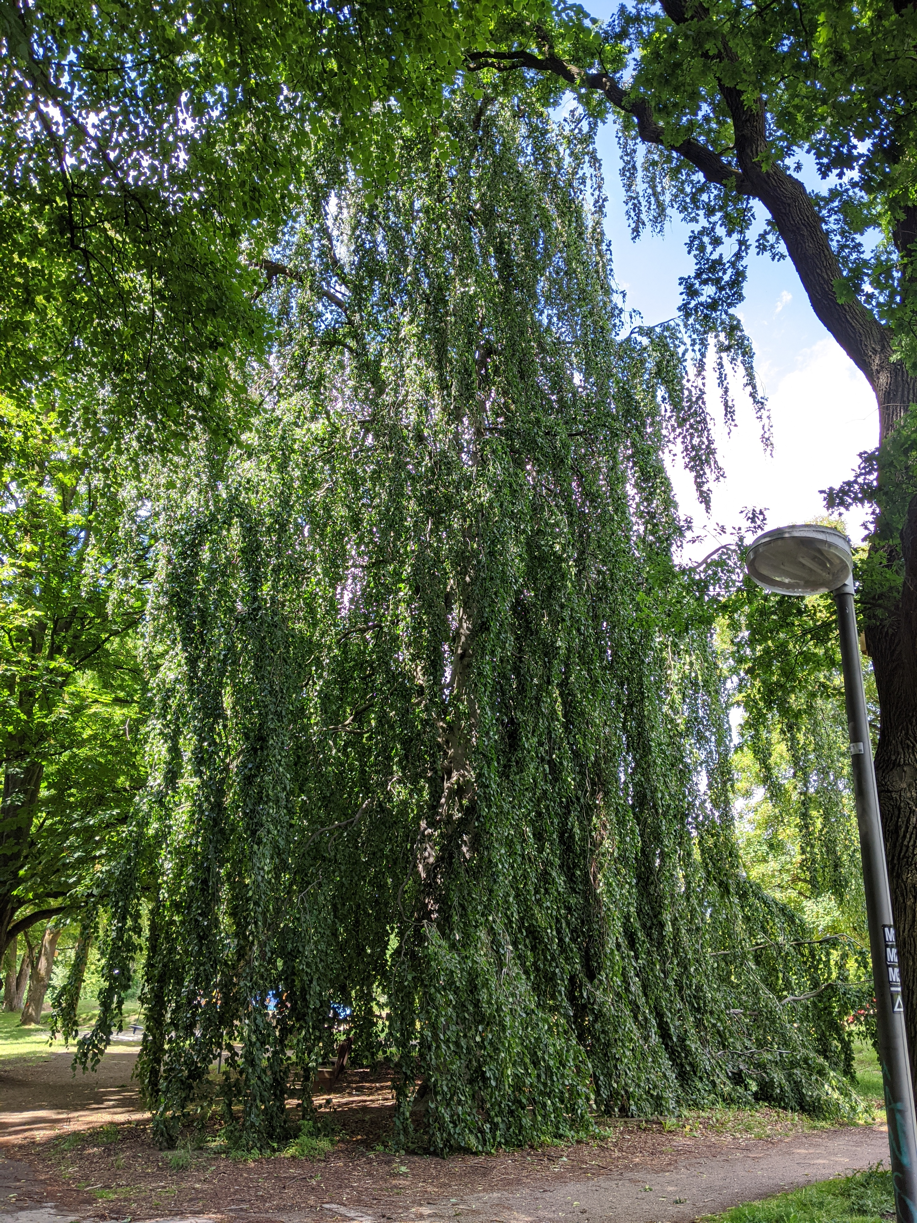 Trauerbuche am Spielplatz im Volkspark Mengede (Dortmund)